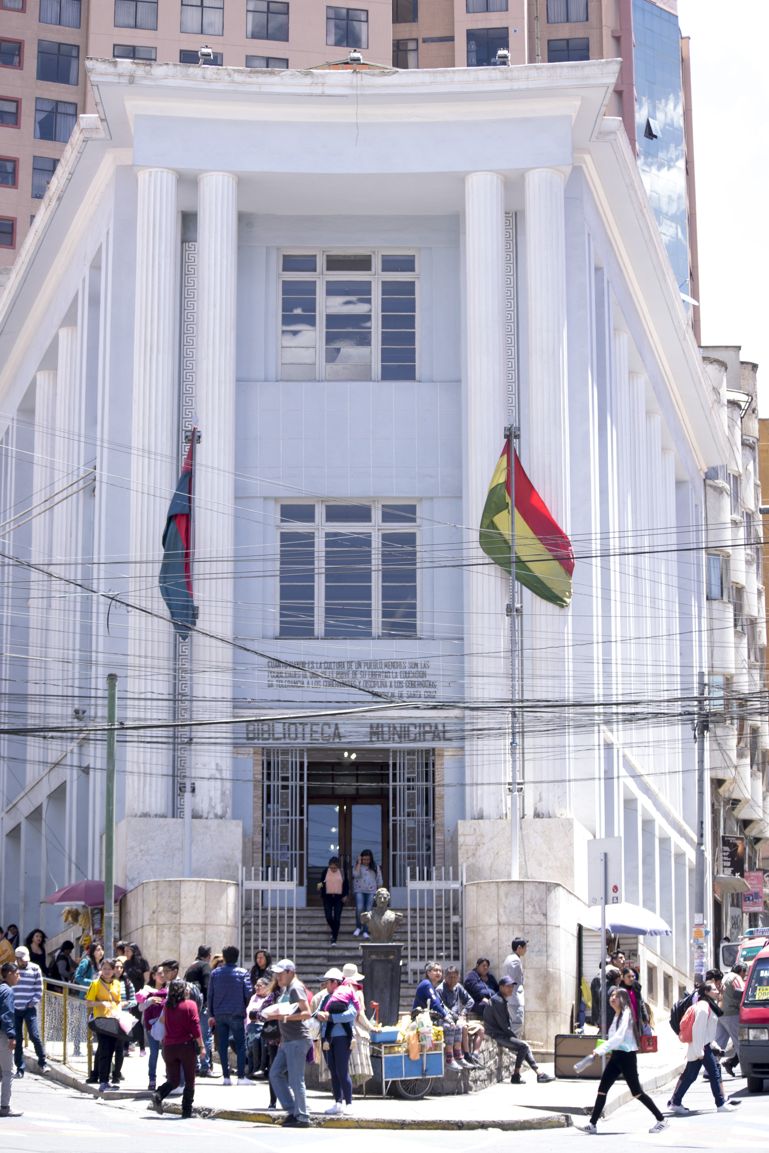 Biblioteca Municipal de La Paz This medium shows the protected monument with the number L/00-132 in Bolivia.